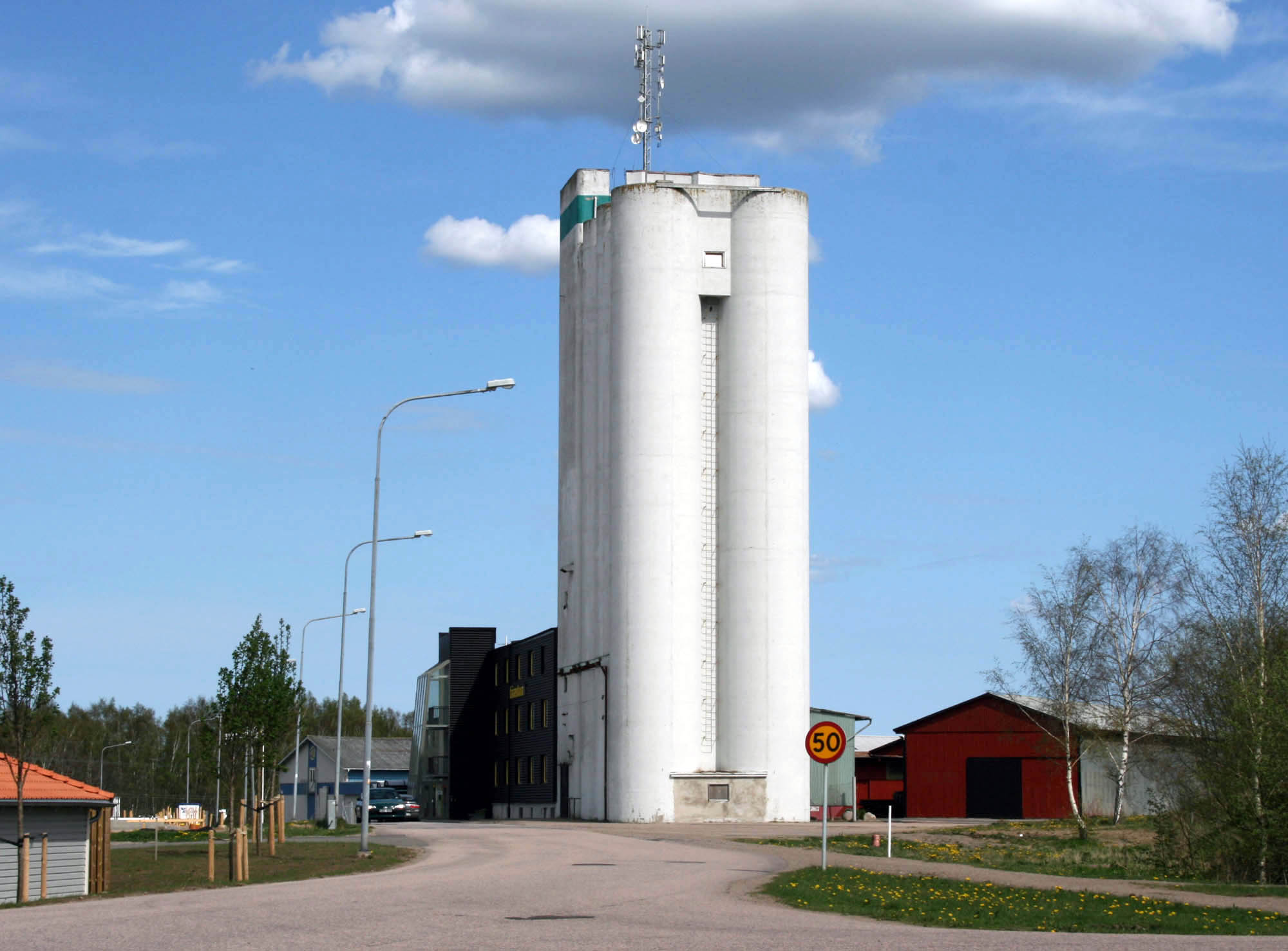 Laholm Silo